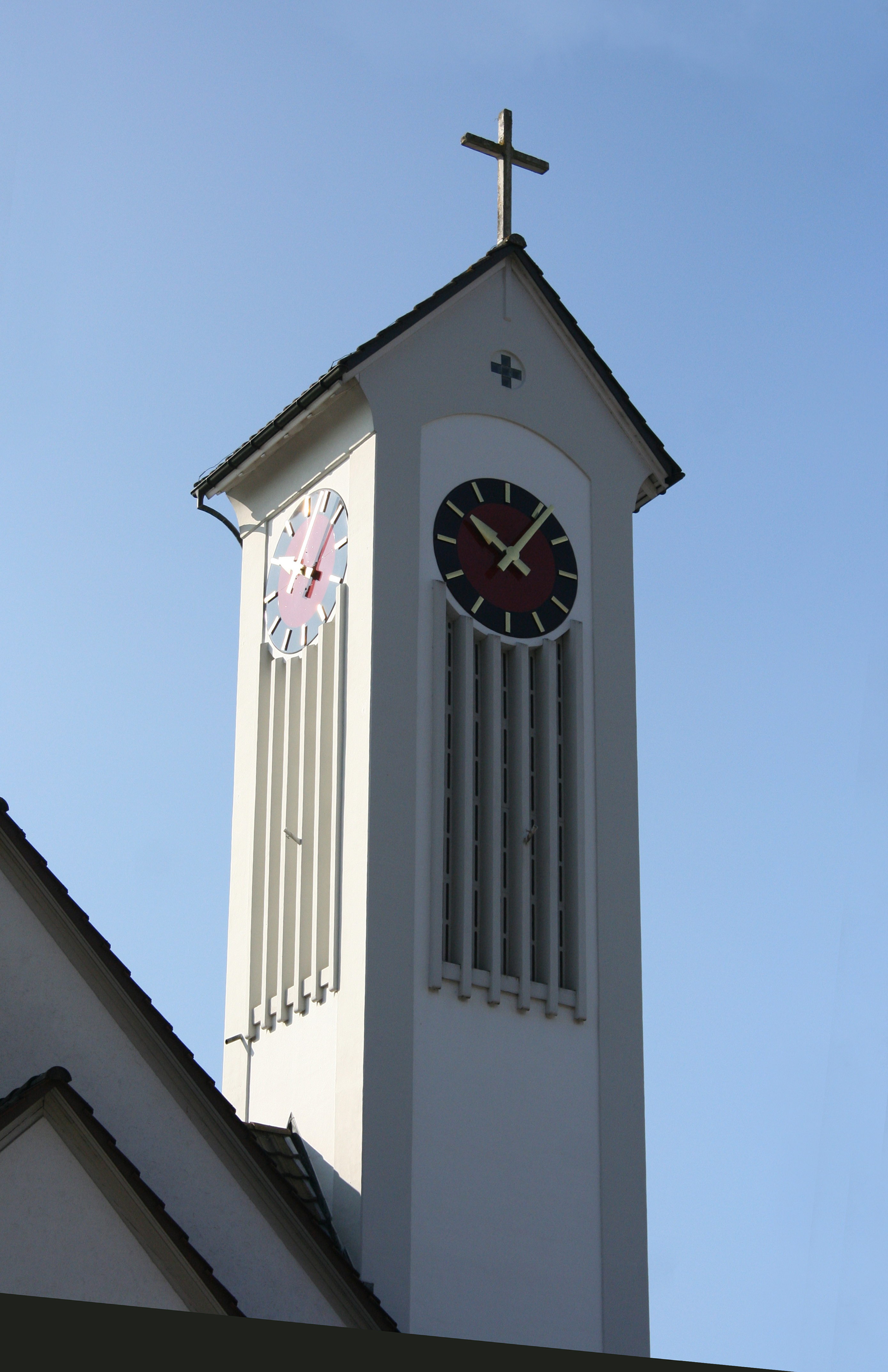 Römisch-katholische Kirche St. Anton Bauma, Kirchturm